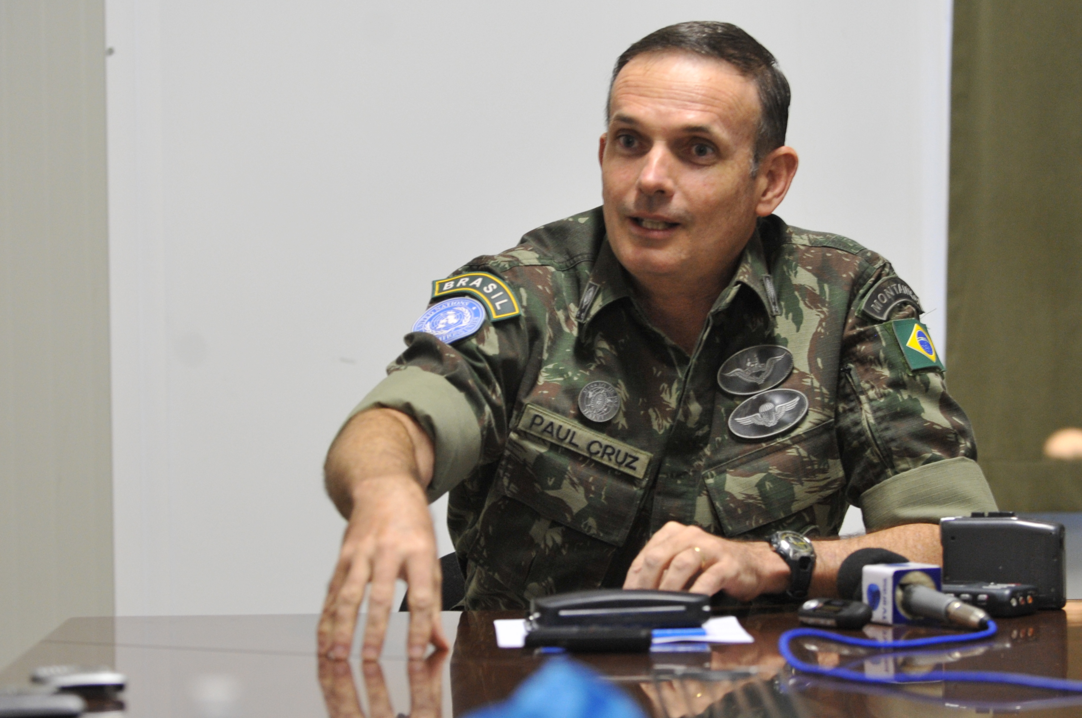 Entrevista do general Luiz Guilherme Paul Cruz, comandante das Forças Armadas da Missão de Estabilização das Nações Unidas no Haiti (Minustah)